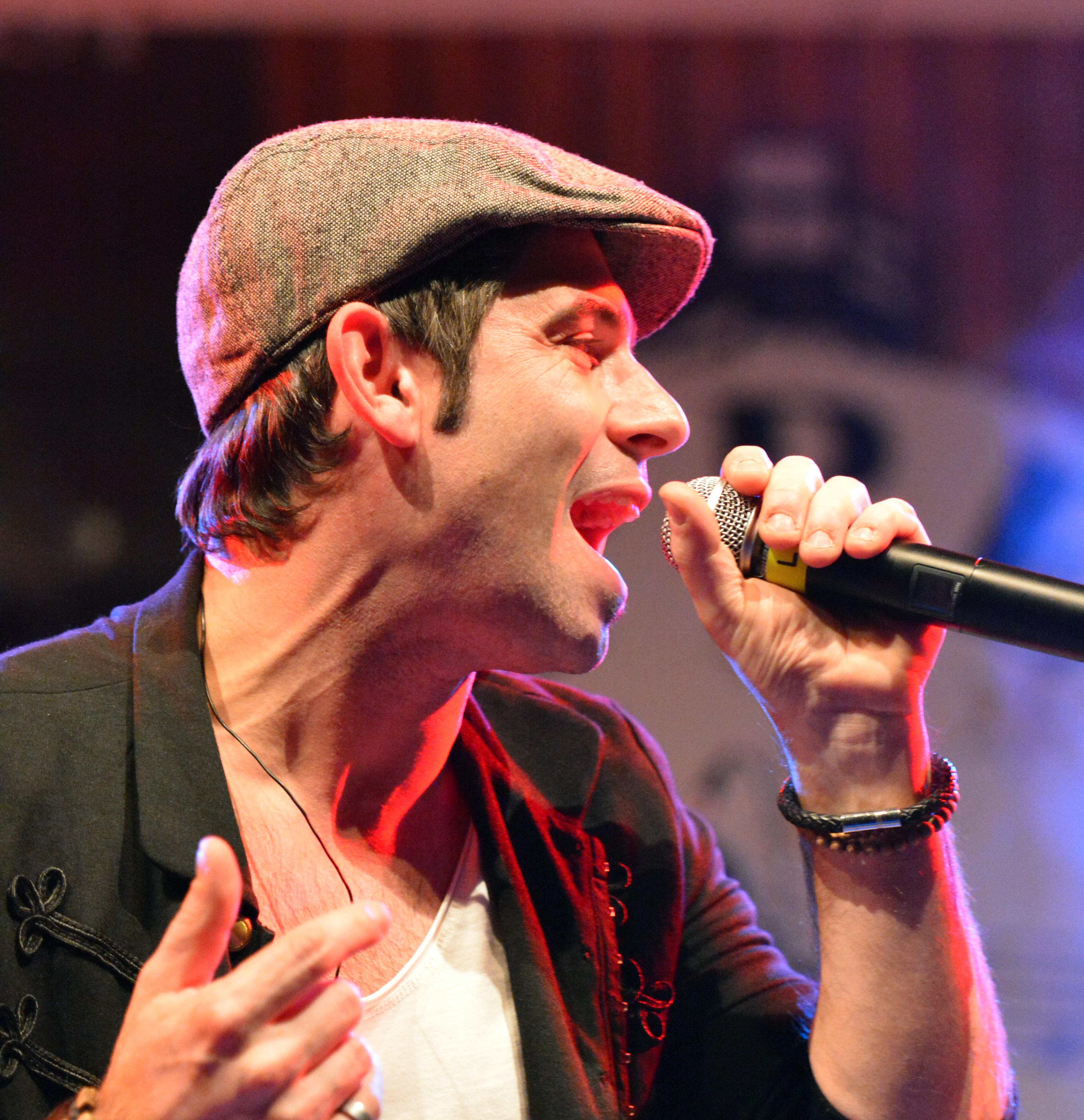 Sascha Pierro von Marquess bei Appen musiziert 2014